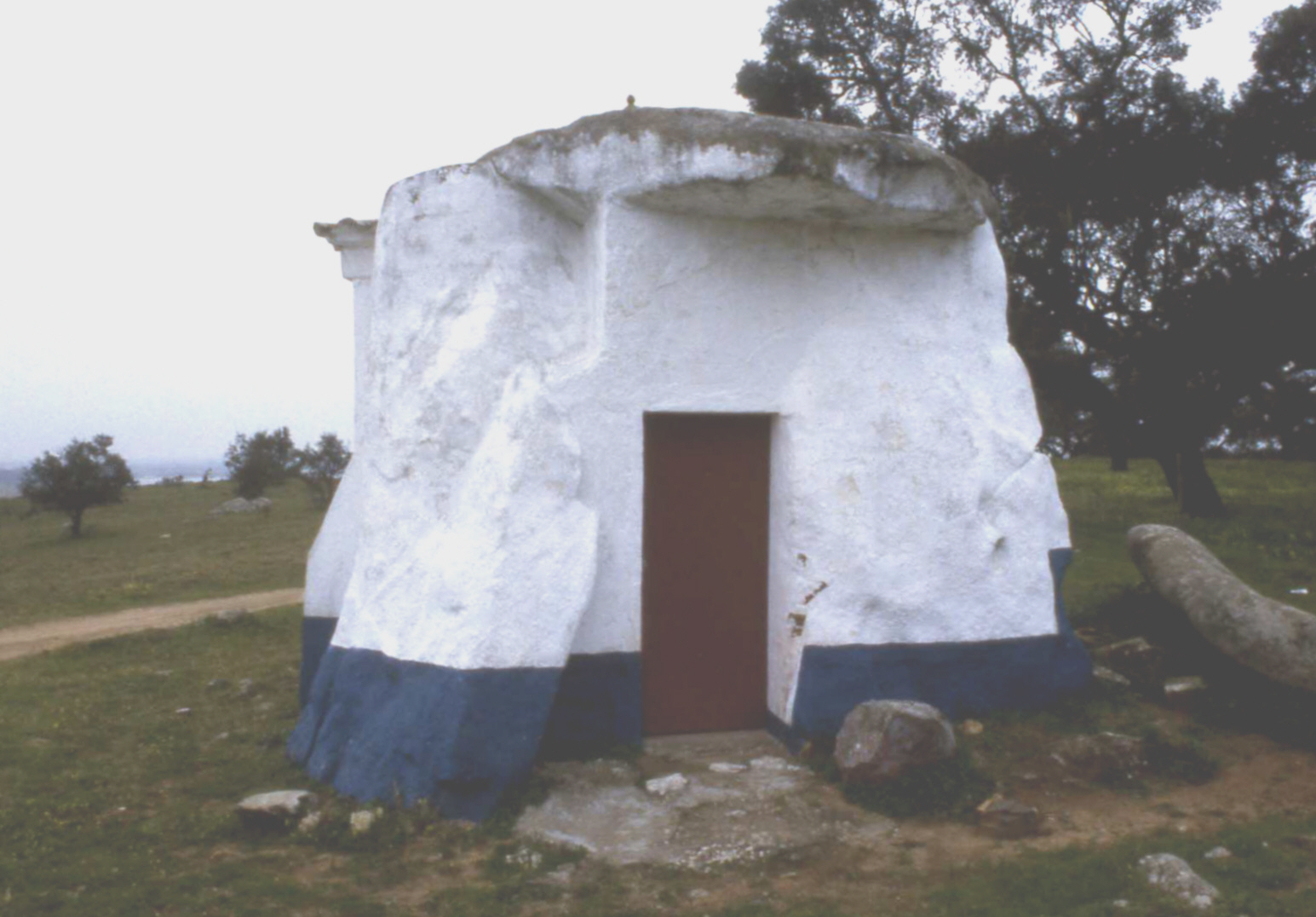 Sao Brissos